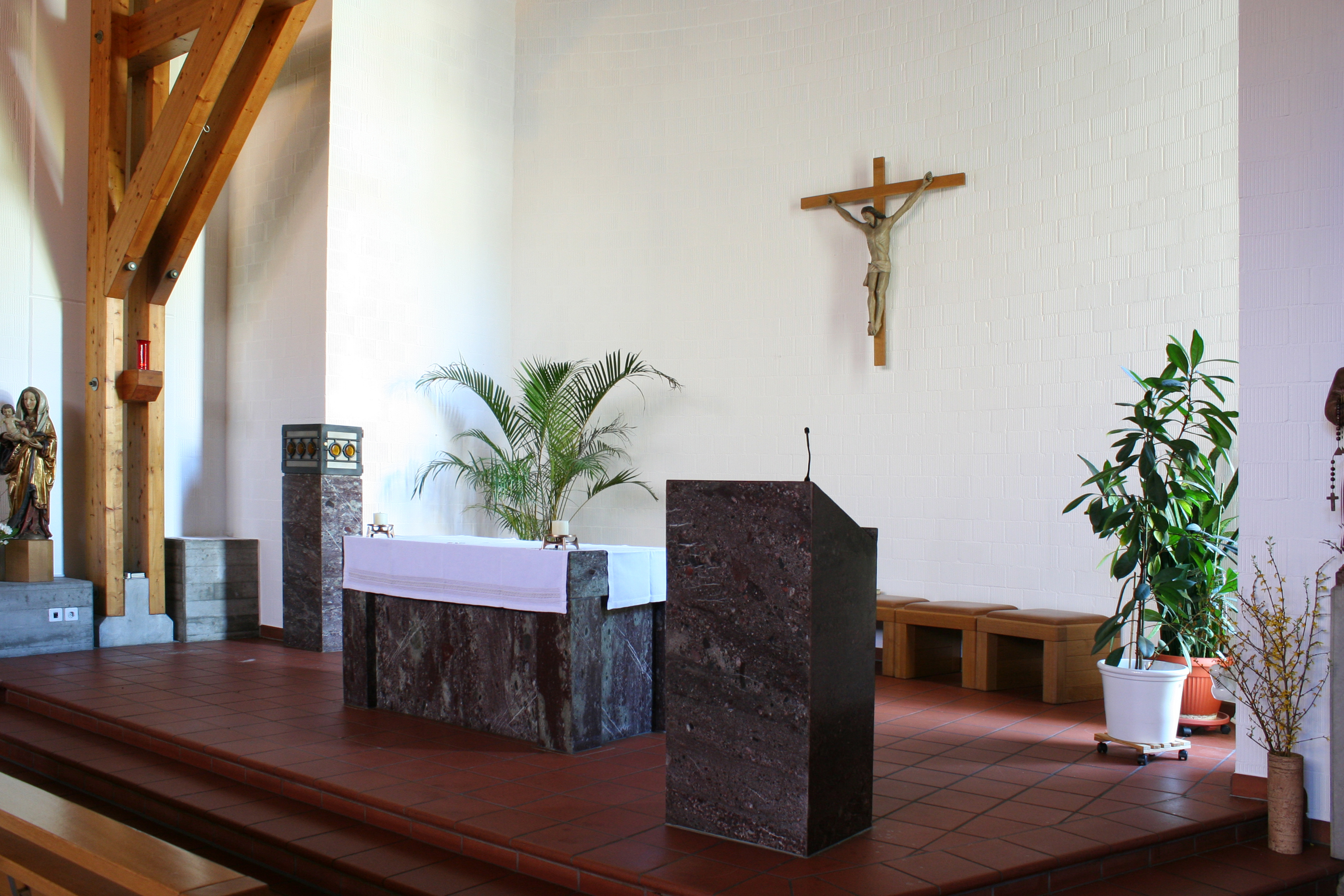 Römisch-katholische Pfarrkirche Bruder Klaus Bäretswil, Innenansicht